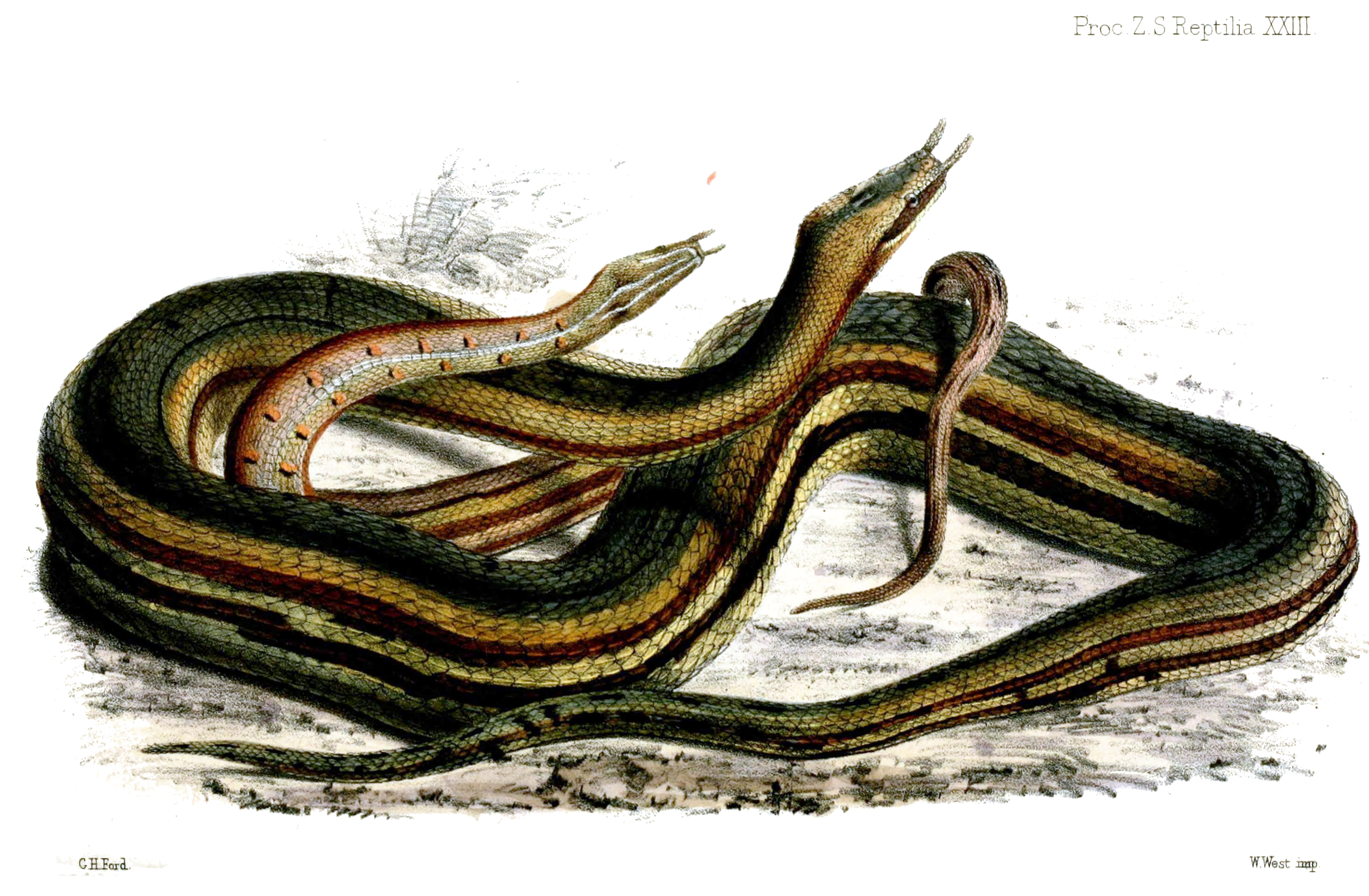 Herpeton tentaculatum = Erpeton tentaculatum